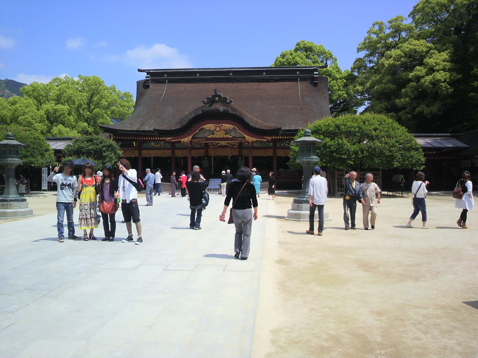 太宰府天満宮本殿